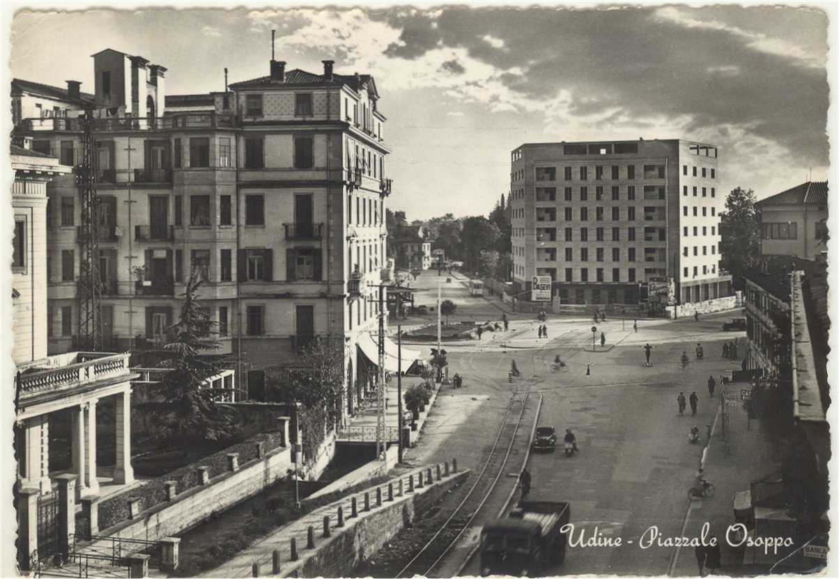 Udine piazzale Osoppo nel 1952